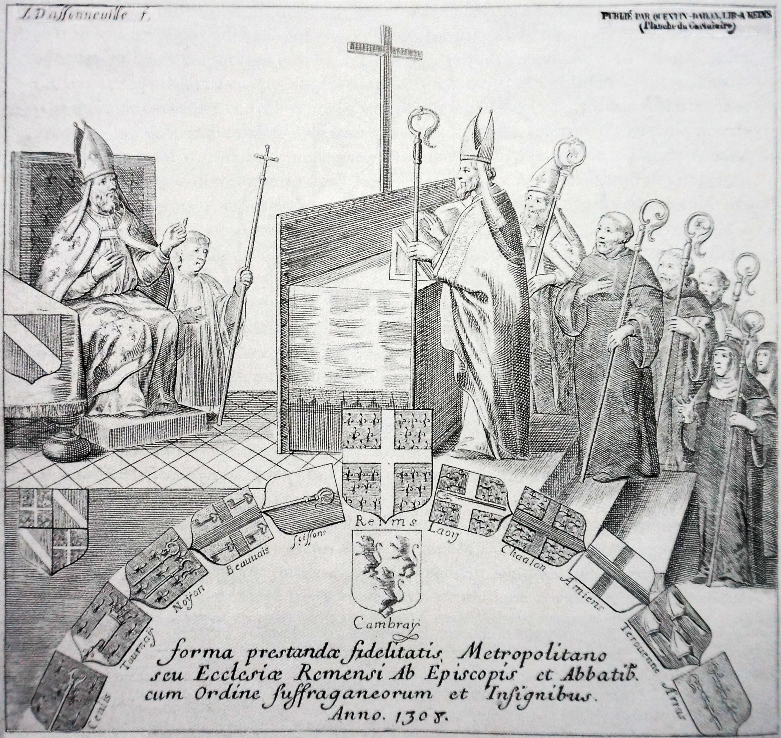 Gravure présentant les suffragants de l'érchevêque de Reims.